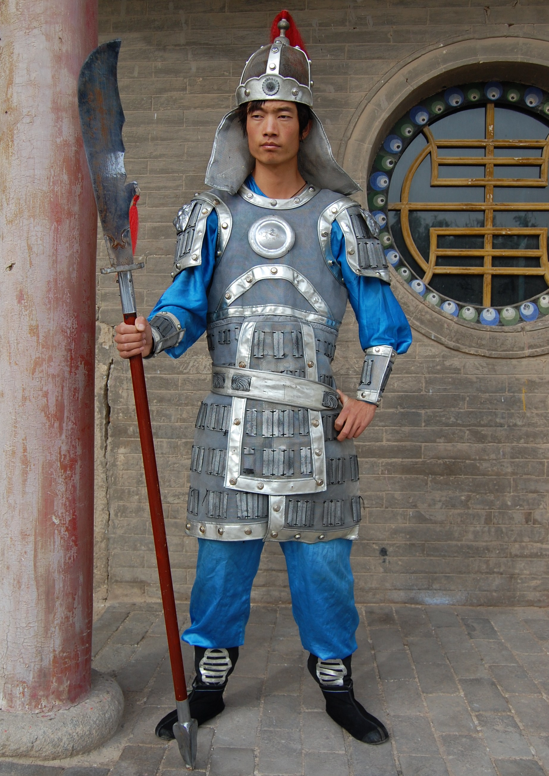 Historischer Soldat im Fort von Jiayuguan, Provinz Gansu, China